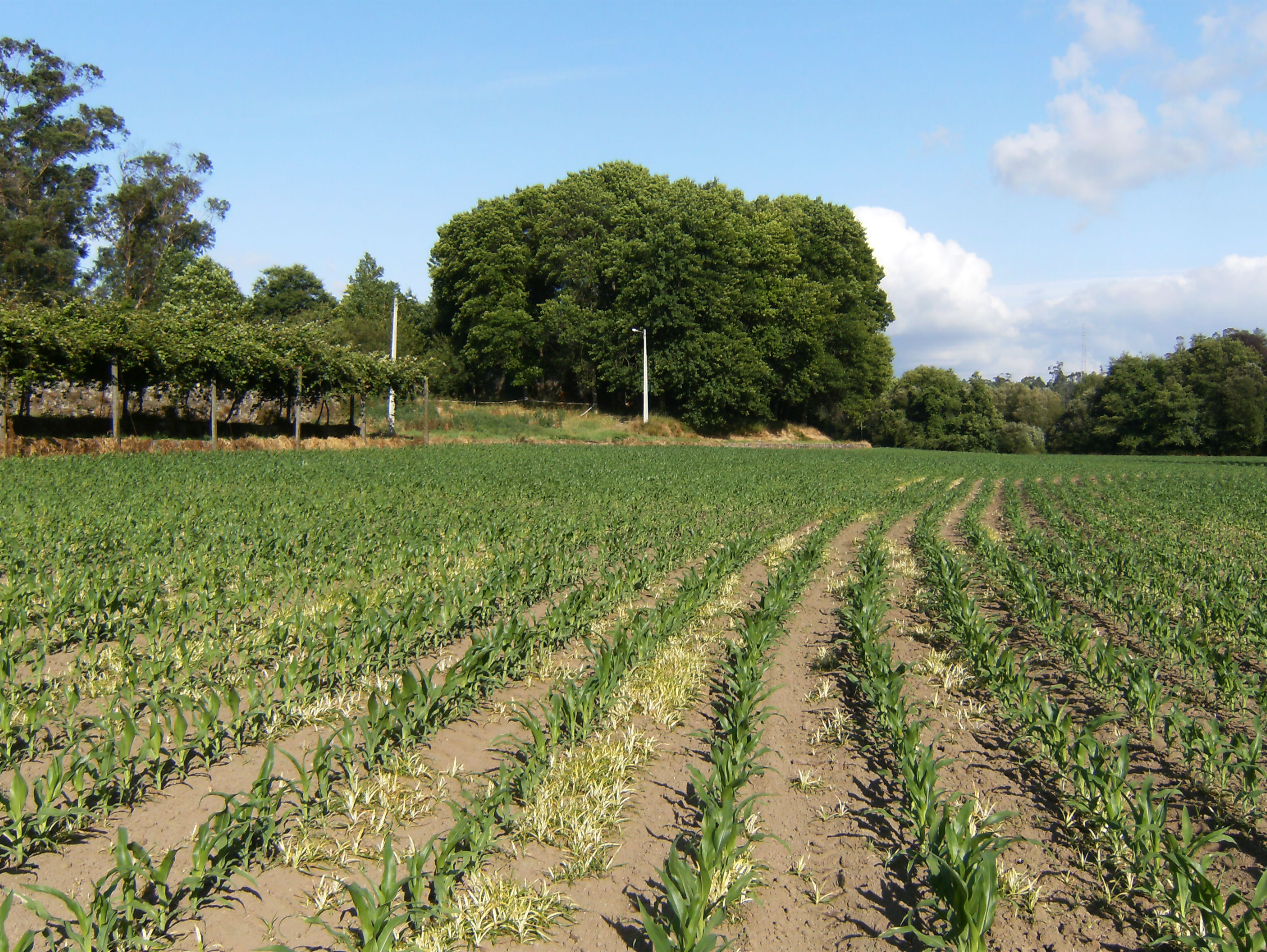 Zona de cultivo de milho, no Parque Urbano de Paços de Ferreira (antiga estação agrária)- Julho de 2008.